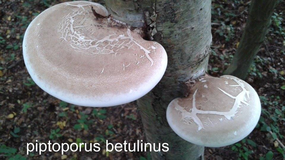 Piptoporus betulinus photo prise en foret nord pas de calais FRANCE